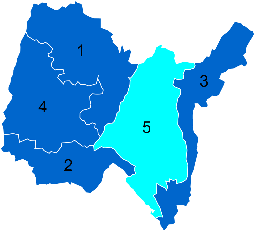 Résultats des élections législatives de l'Ain en 2012